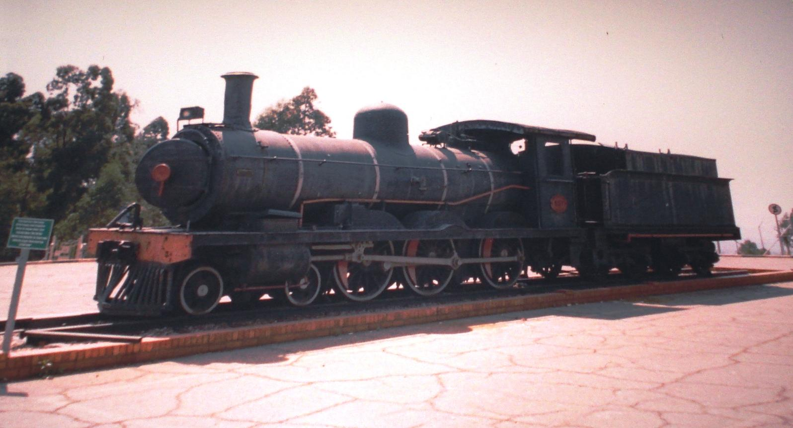 Lokomotive bei Fort Klapperkop - Pretoria - RSA